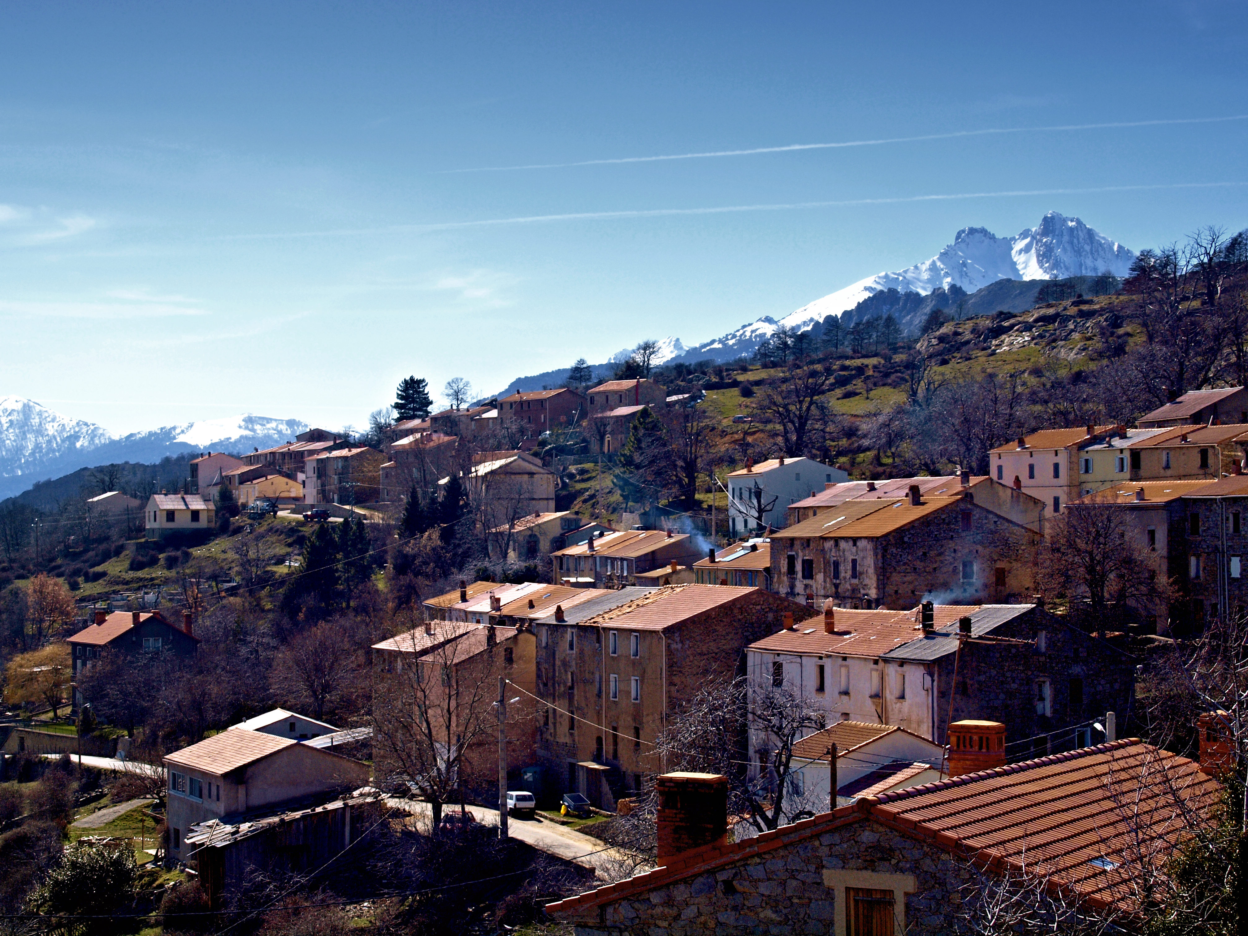 Lozzi (Corsica) - Vue du village de Lozzi